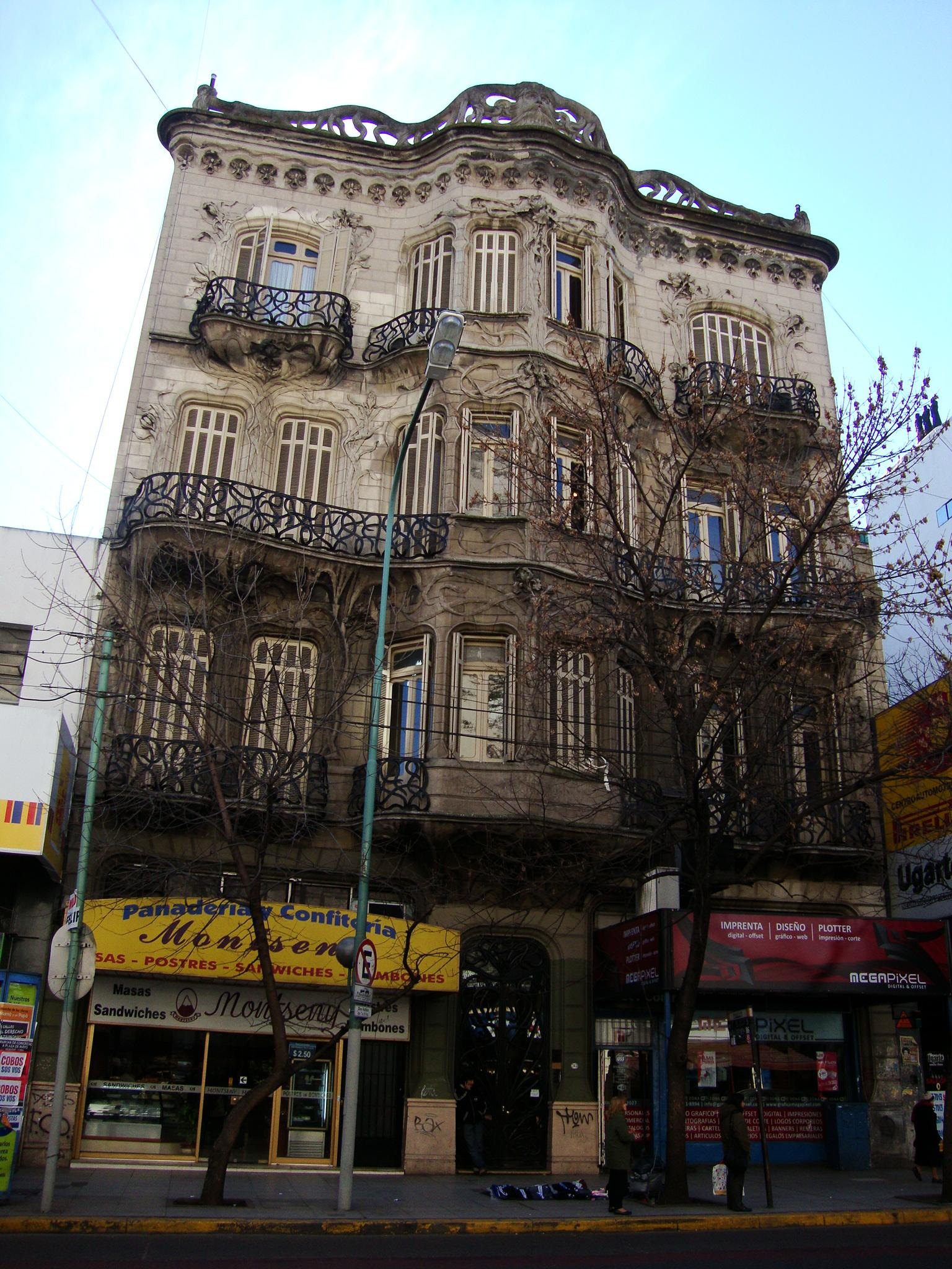 La Casa de los Lirios, un eduiificio de viviendas proyectado por el ingeniero español Eduardo Rodríguez Ortega hacia 1903. Buenos Aires, Argentina. Estilo: Modernismo catalán. Dirección: Av. Rivadavia 2027/31